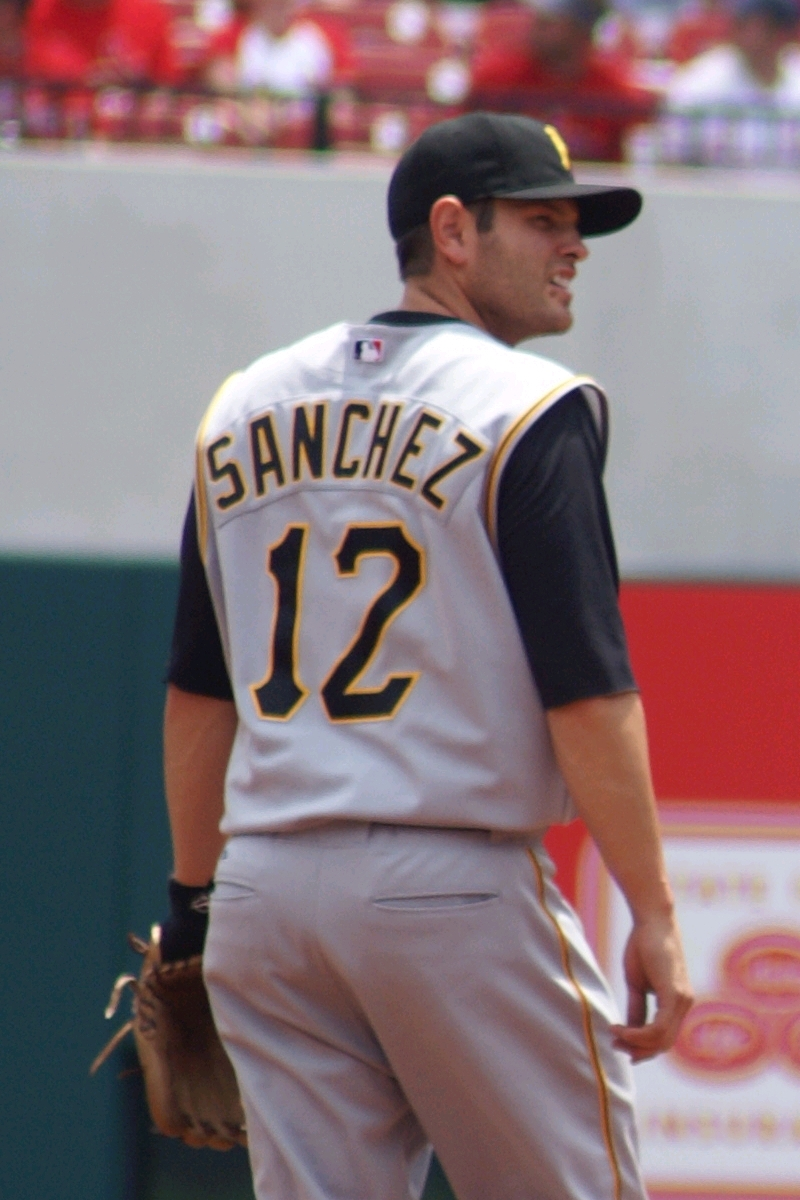 Freddy Sanchez